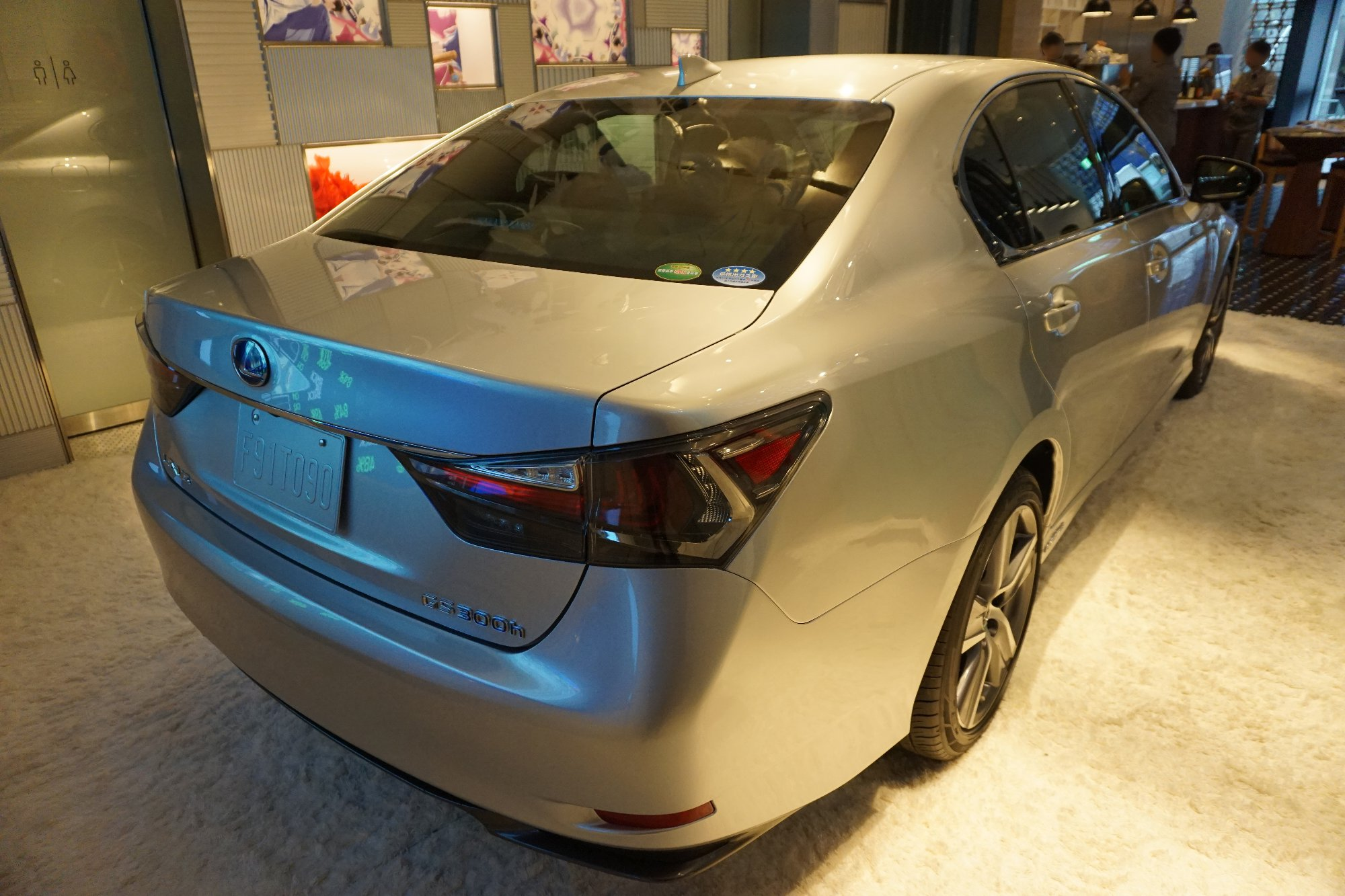 LEXUS GS300h(2015model) リア INTERSECT by LEXUS TOKYOで撮影